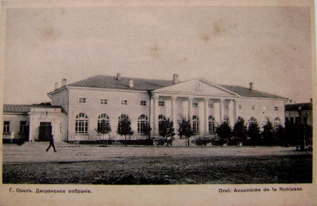 Открытка с изображением здания Дворянского собрание, расположенного в Орле. XIX век. Изображение взято из книги "Владимир Матвеев. Орловская губерния. Летопись Орловского края на старинных открытках. Под общей редакцией заслуженного работника культуры Российской федерации А. П. Олейниковой. Орёл. 2007. .